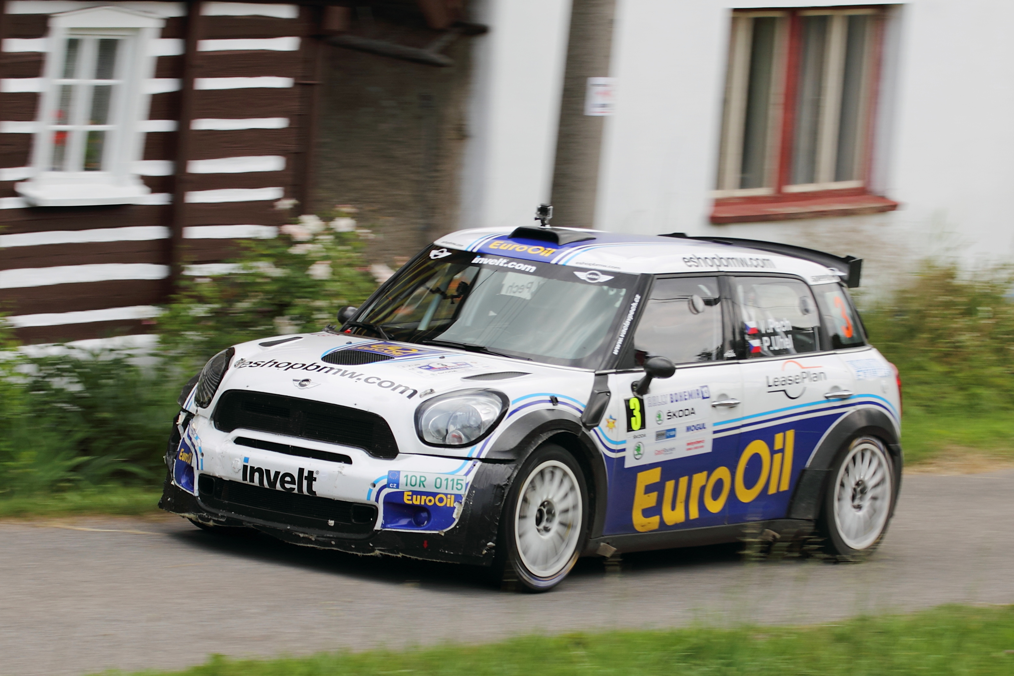 Václav Pech jun., Petr Uhel, Rally Bohemia, 2013